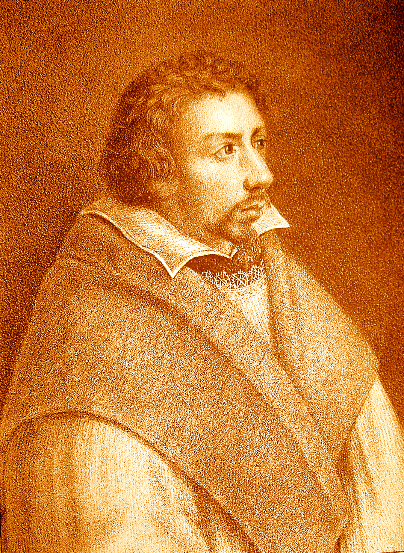 Aegidius Gelenius, Weihbischof von Münster und Kanonikus von St. Andreas zu Köln 1631